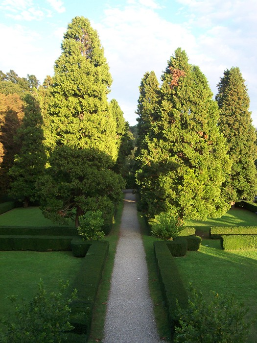 Canonica Lambro - Parco di Villa Taverna